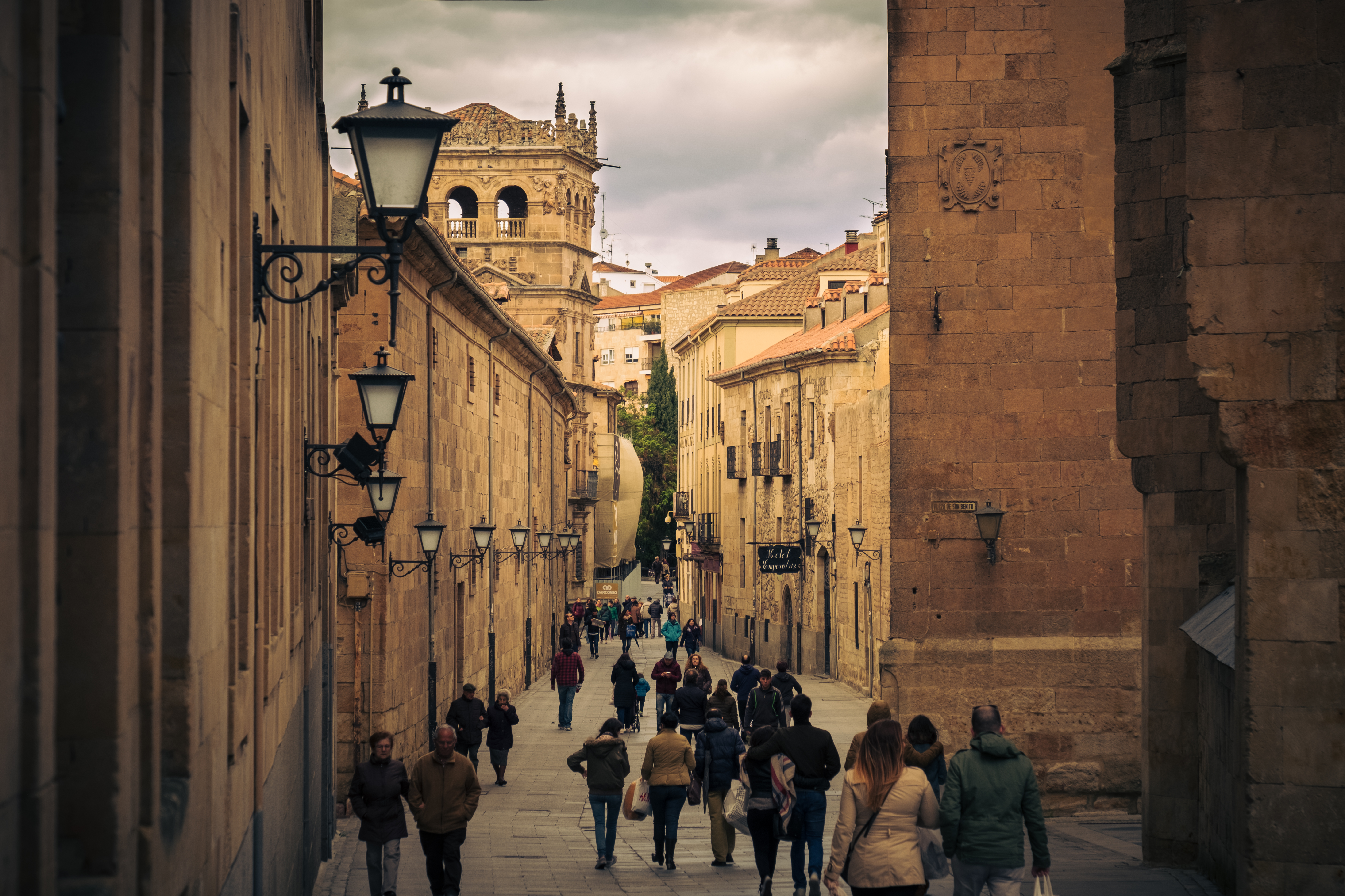 Calle Compañía. Salamanca.